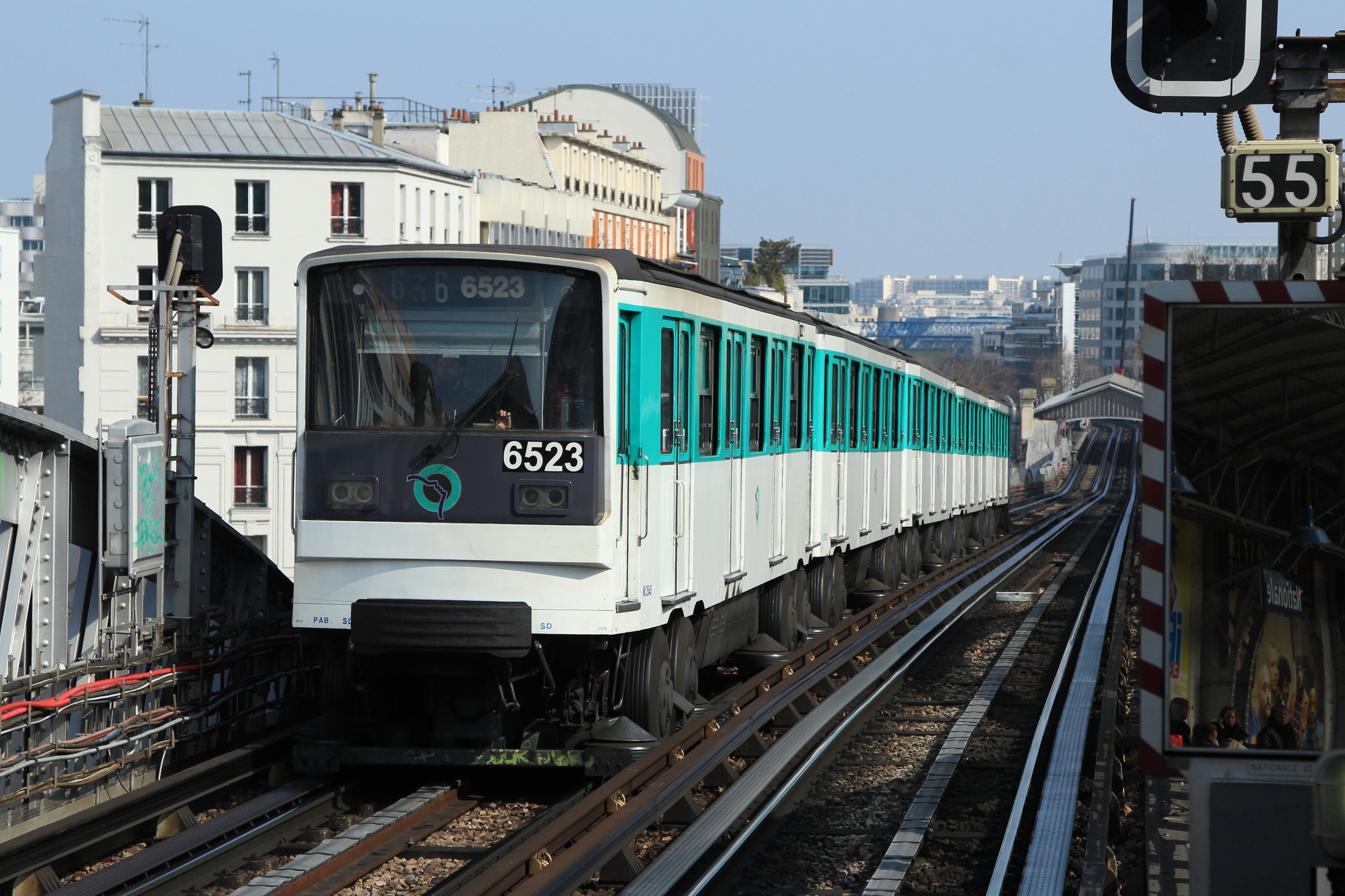 Un métro de type MP 73 à destination d'Étoile approche de la station Nationale de la ligne 6 du métro parisien.